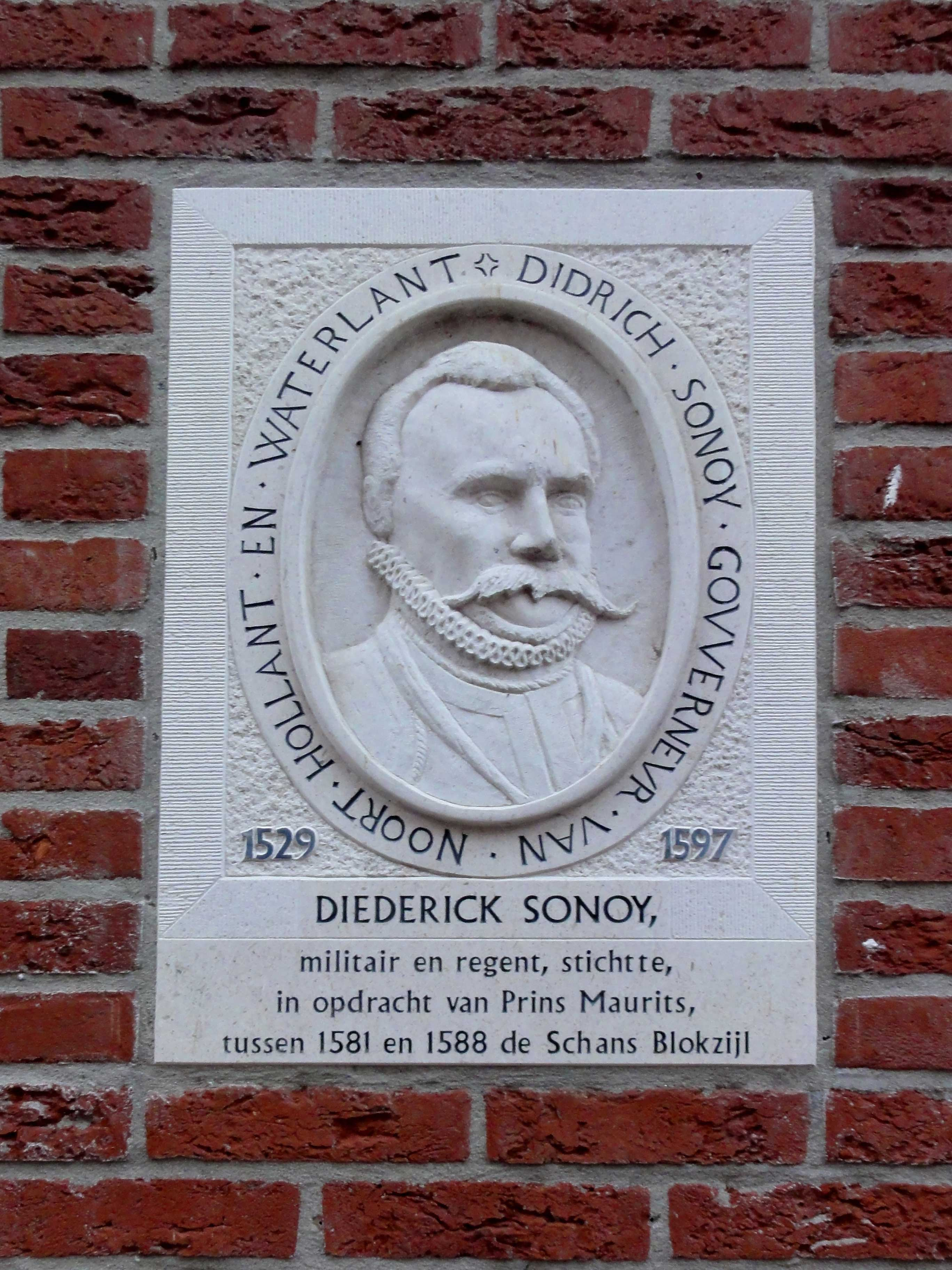 Plaquette - Kerkstraat 9A Blokzijl - ter herinnering aan Diederick Sonoy, stichter van de schans Blokzijl